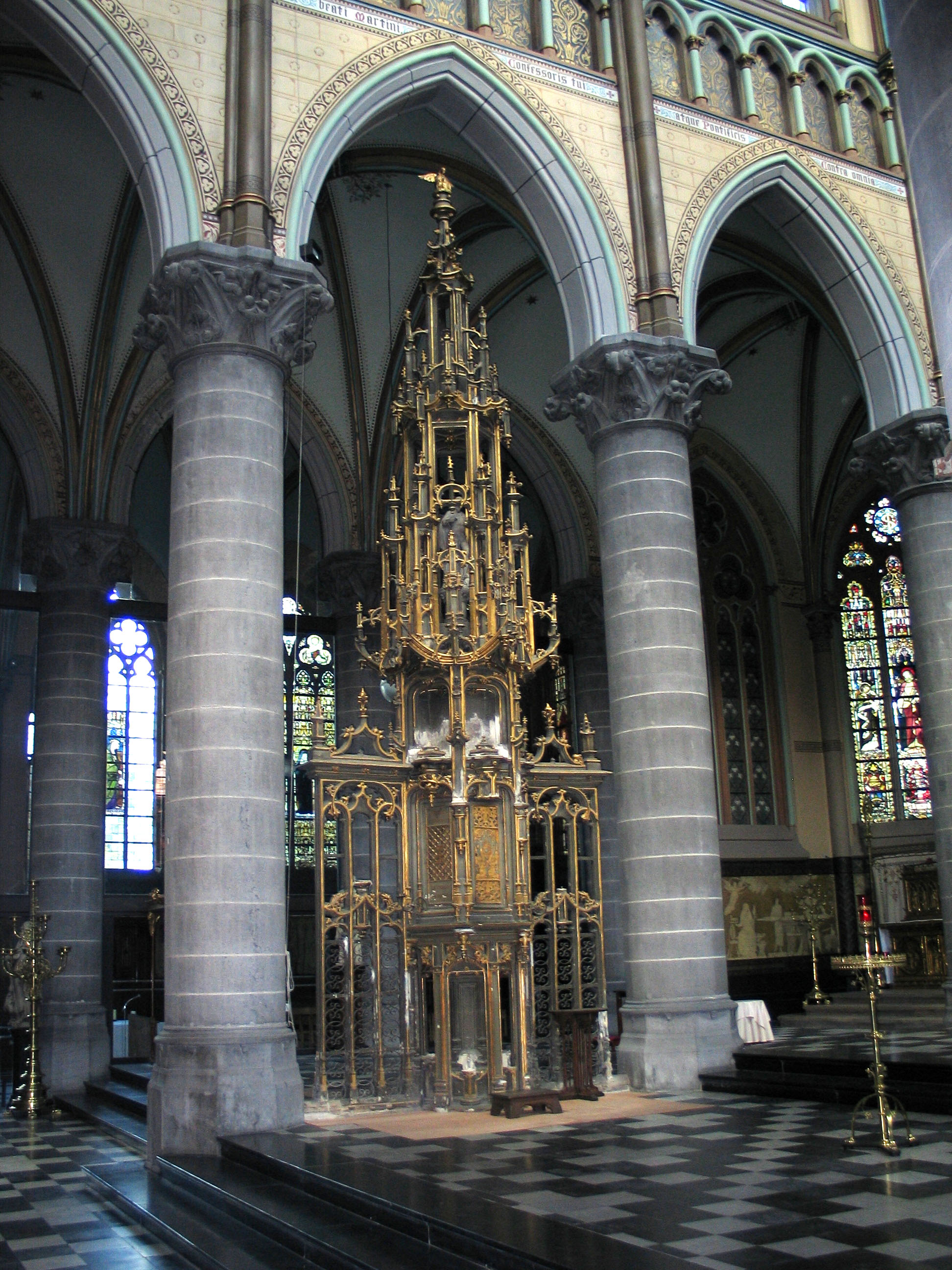 Sacrament tower in de Saint-Maartens Church of Kortrijk